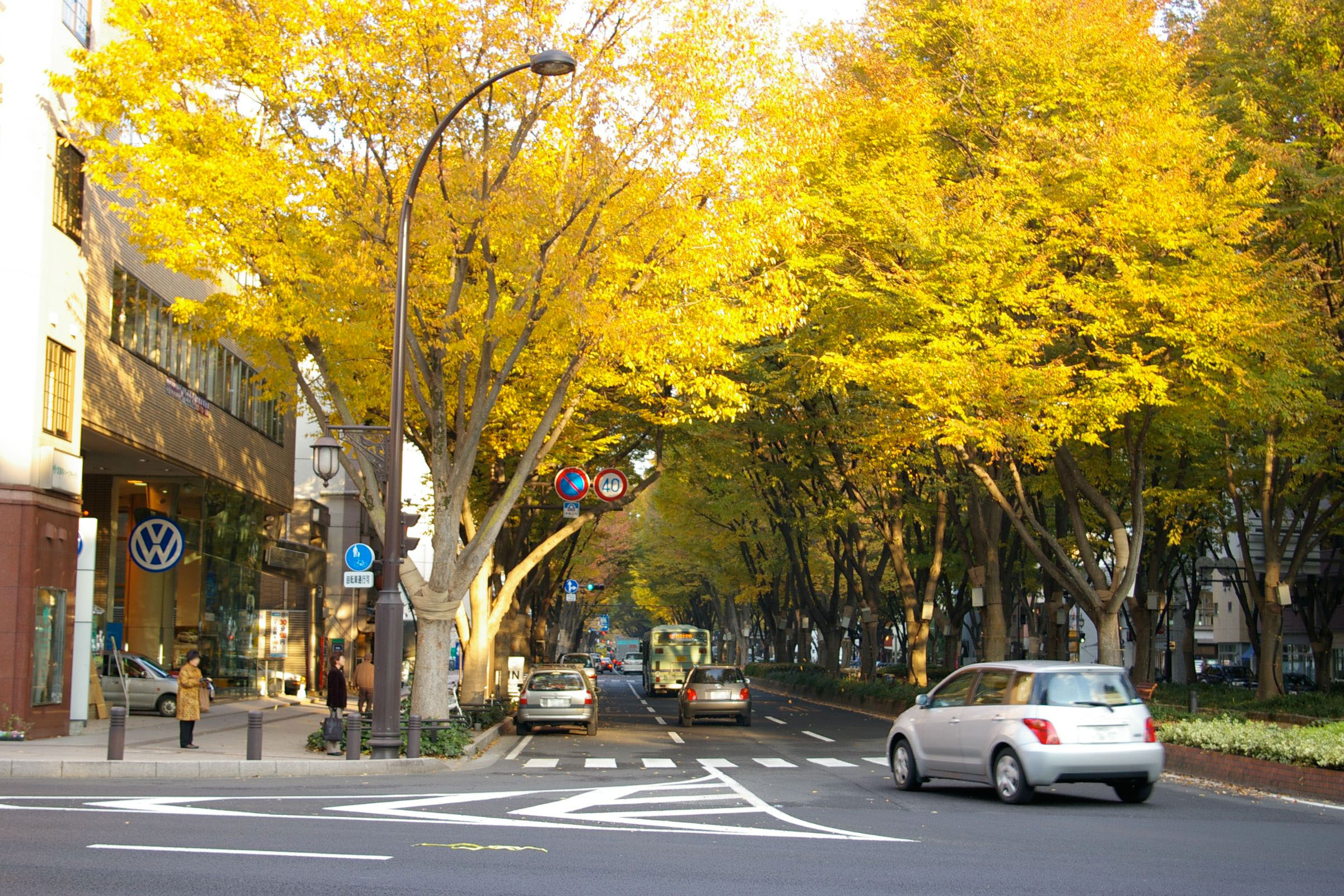 Jozenji St. in Autumn.